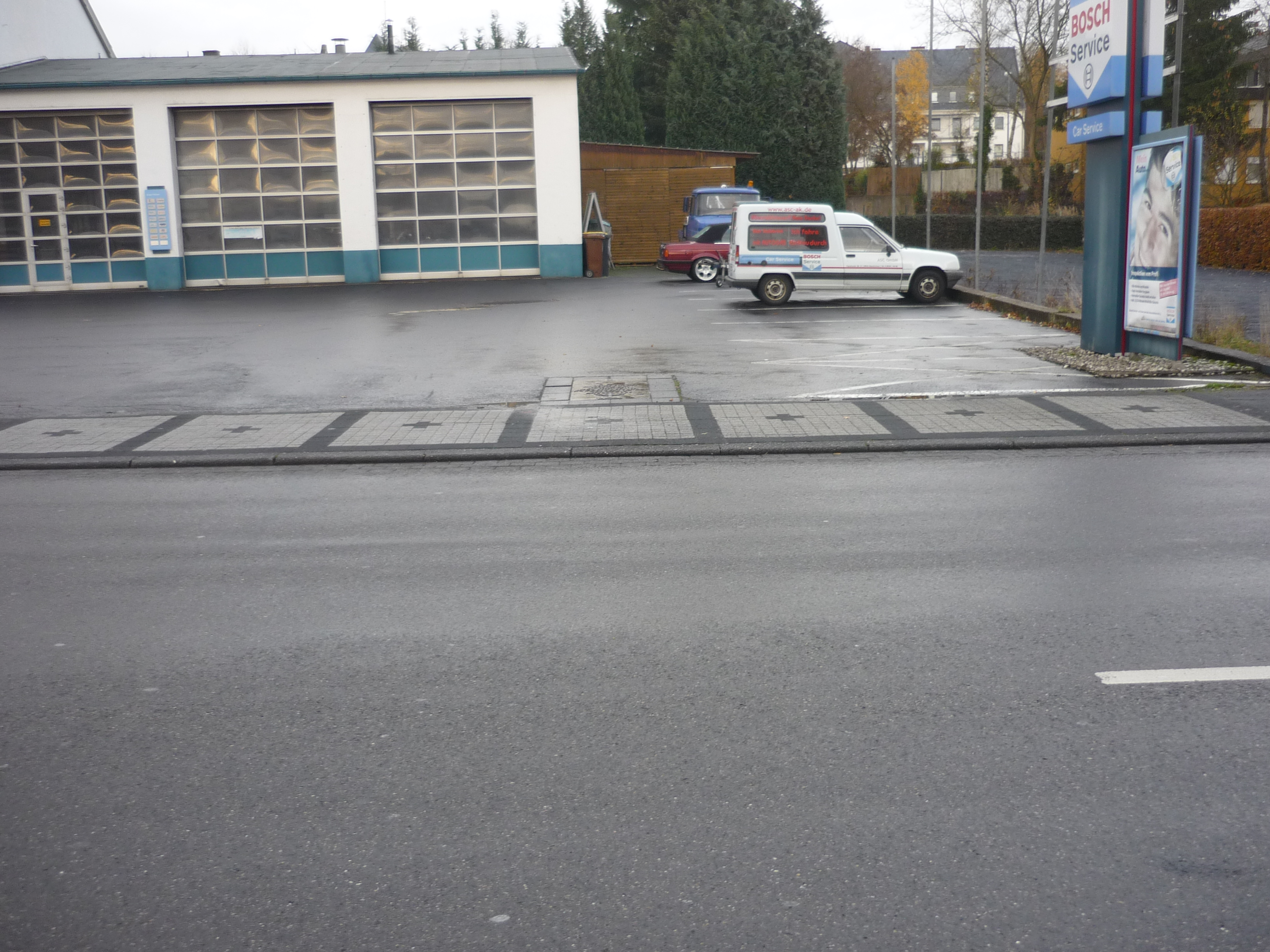 Blick auf den Standort der ehemaligen Synagoge Altenkirchen (Westerwald), Frankfurter Straße, heute Parkplatz, vorn Gedenktafel